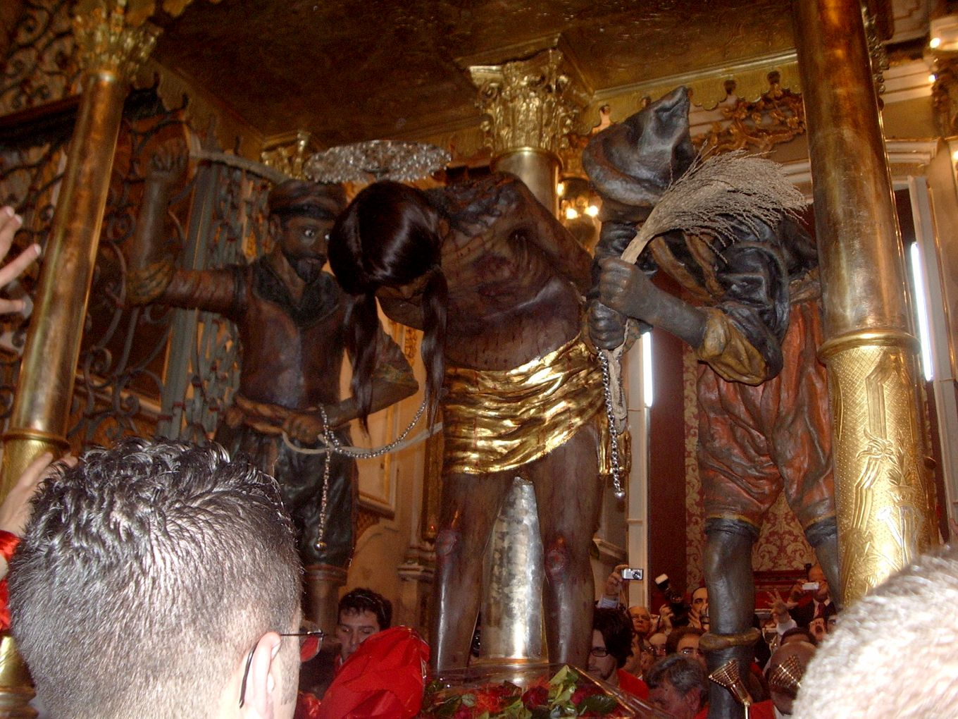 Foto Personale: F. Tumino